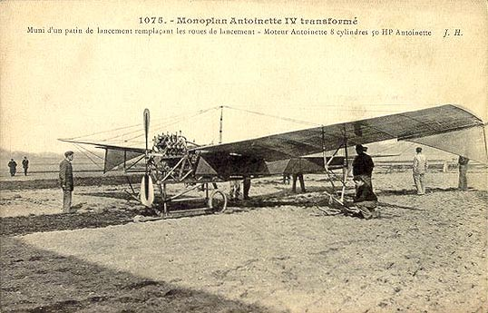 Contemporary postcard circa 1909.